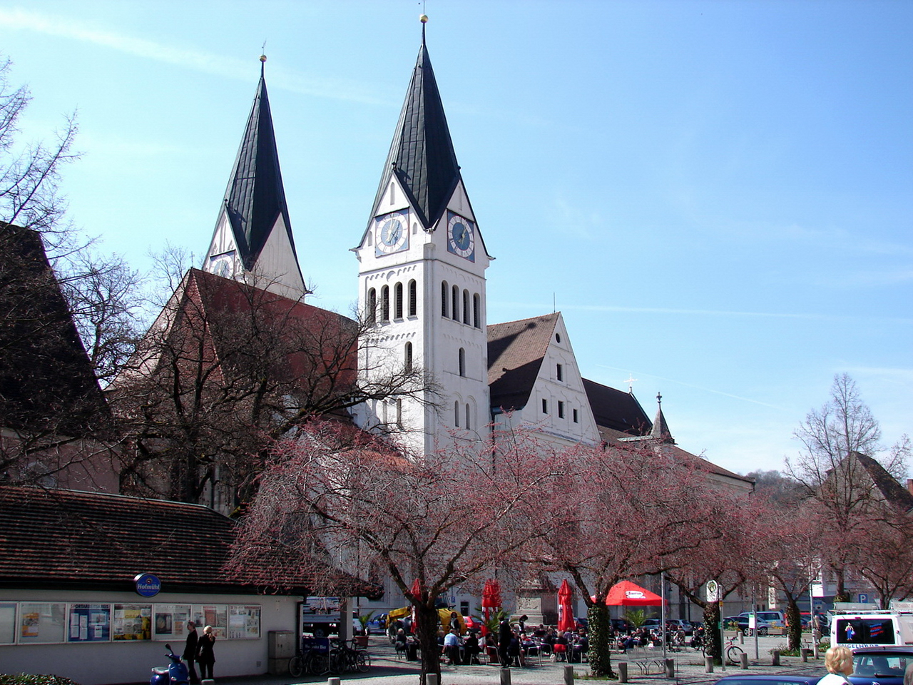 Der Dom zu Eichstätt (St. Salvator, U.L. Frau und St. Willibald)